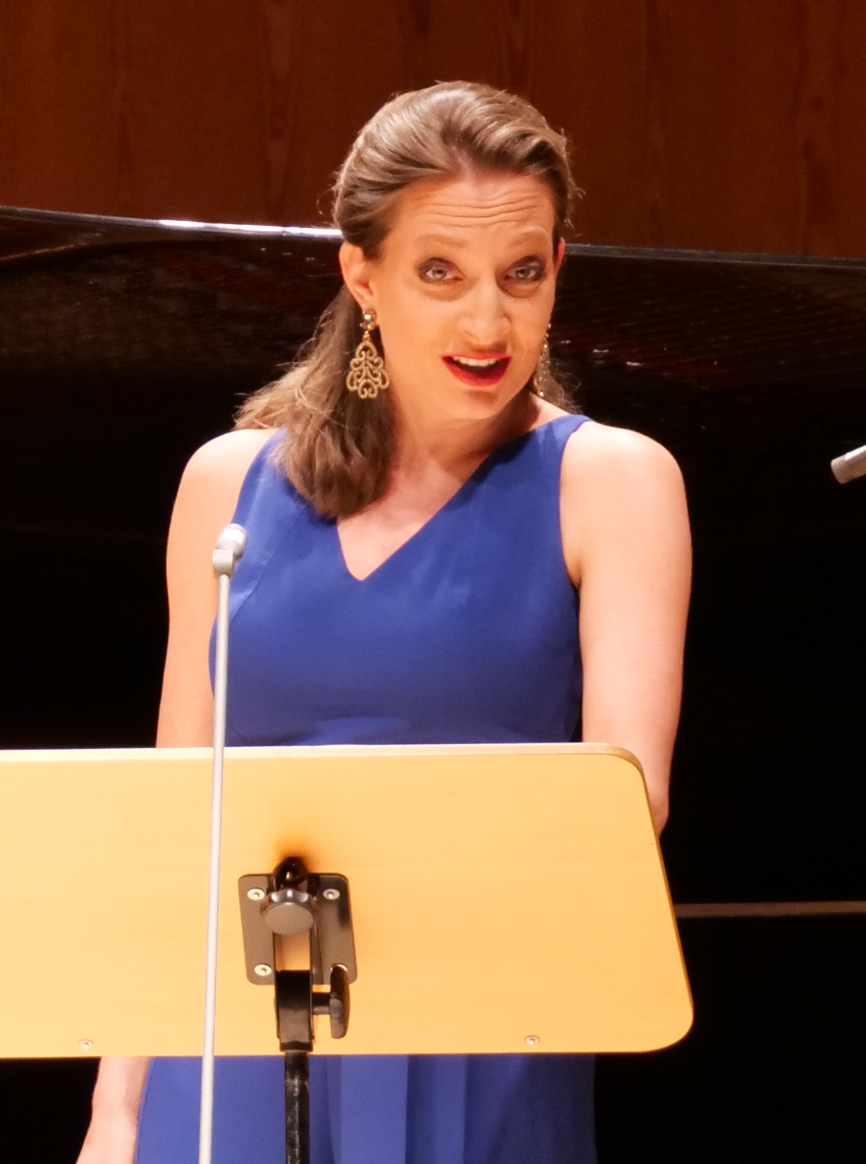 Thomas Quasthoff (Lesung), Justus Zeyen (Klavier) & Christiane Karg (Sopran) beim Meisterkonzert am 14.05.2019 im Konzerthaus der HfM Detmold. CC BY-SA 4.0